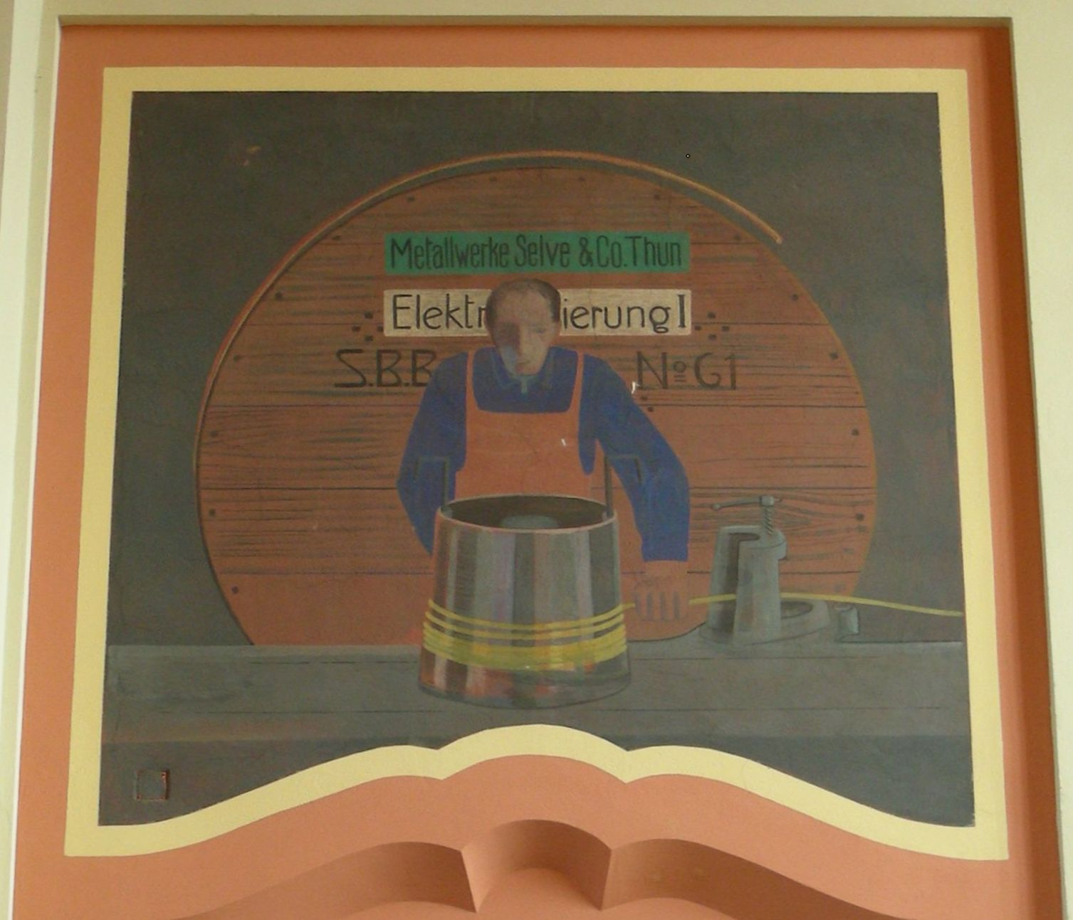 Bahnhofshalle Thun: Wandmalerei